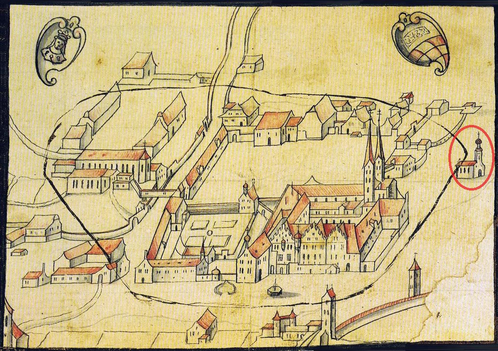 Das 1633 zerstörte Kloster in Kempten, rechts eine roter Kreis als Markierung der 973 geweihten Nikolauskapelle